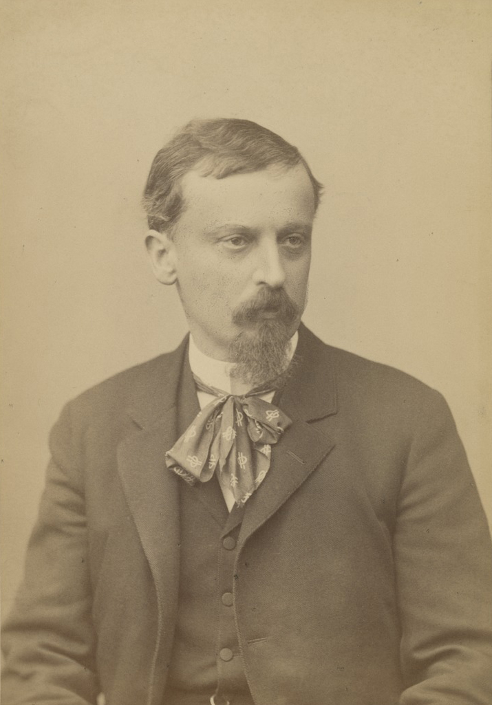 Portret Henryka Sienkiewicza